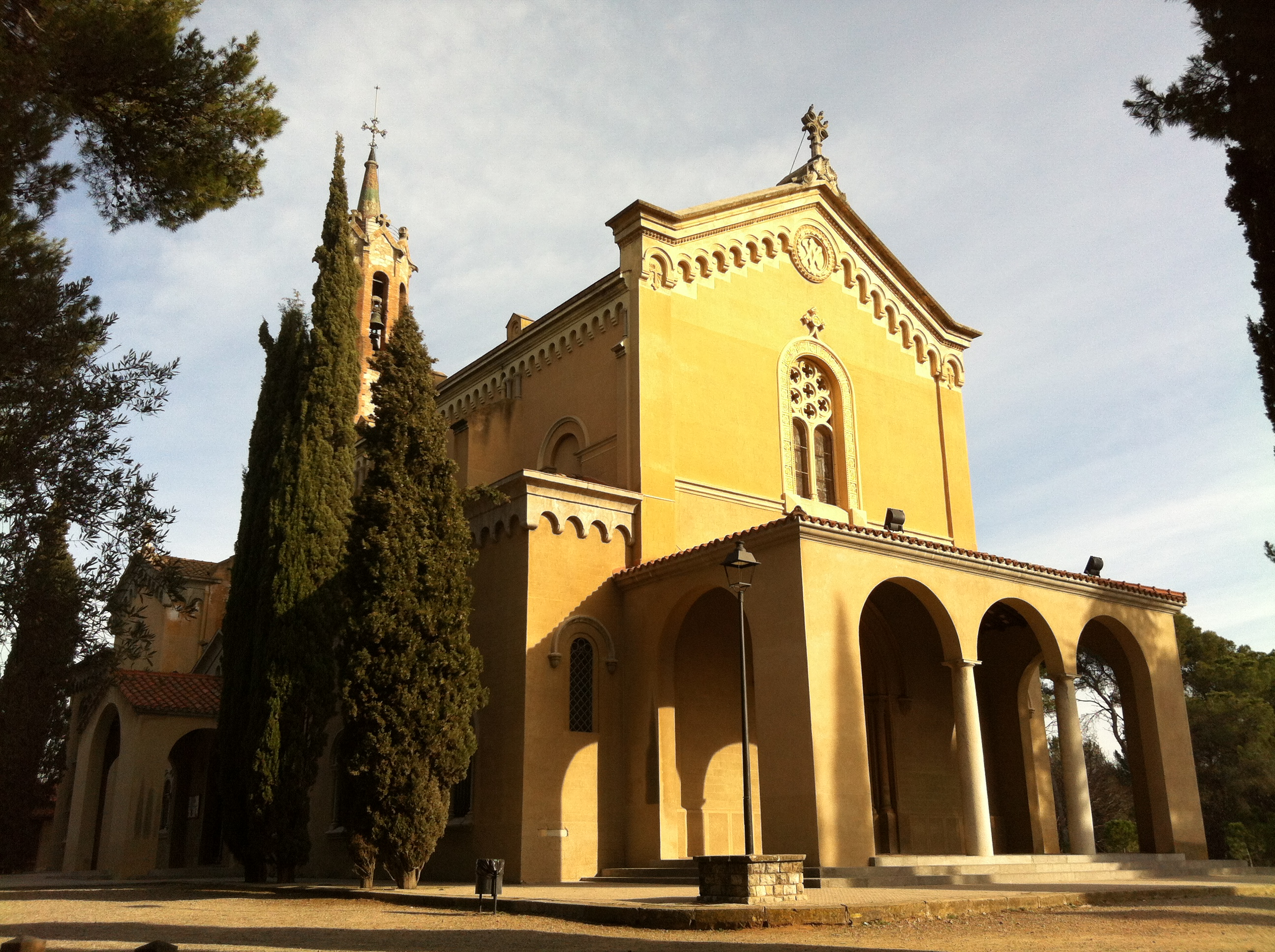 Description